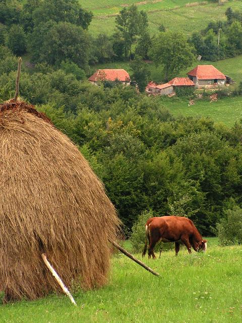 Király-erdei táj Vársonkolyosnál